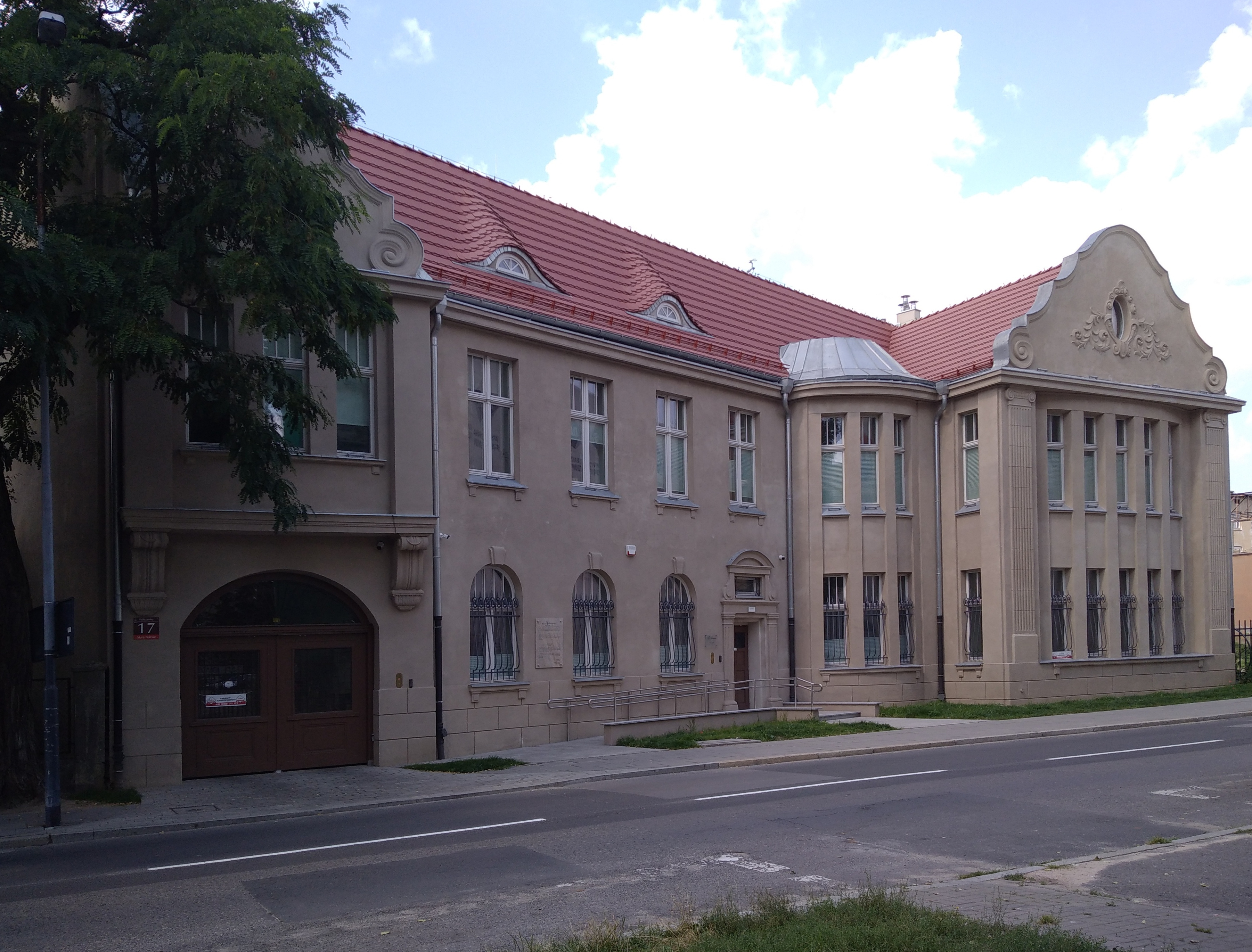 Budynek Zygmunta Teemana, filmowa Szuflandii, ul. Wólczańska 17, Łódź